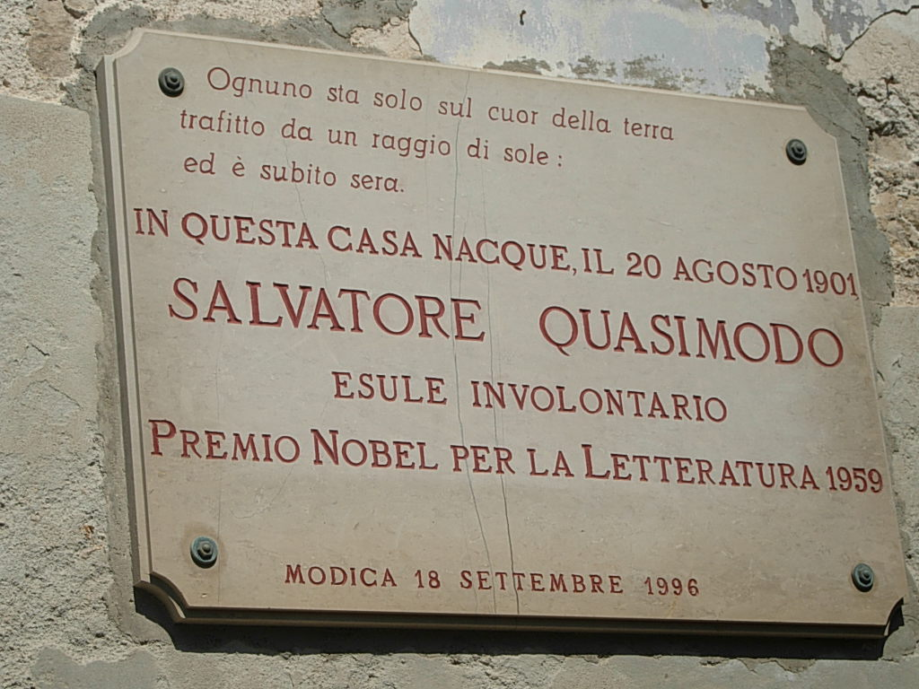 Targa casa natale Quasimodo a Modica Foto personale concessa in PD